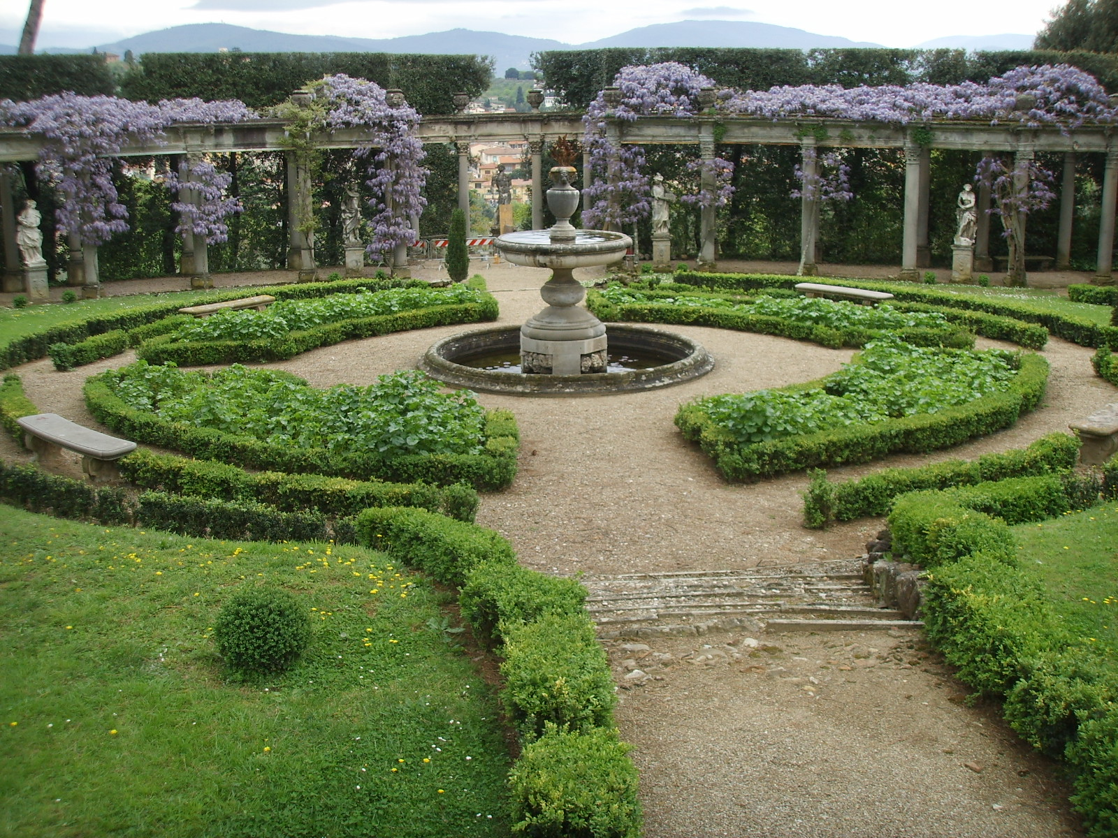 Villa la pietra, giardino est, rotonda